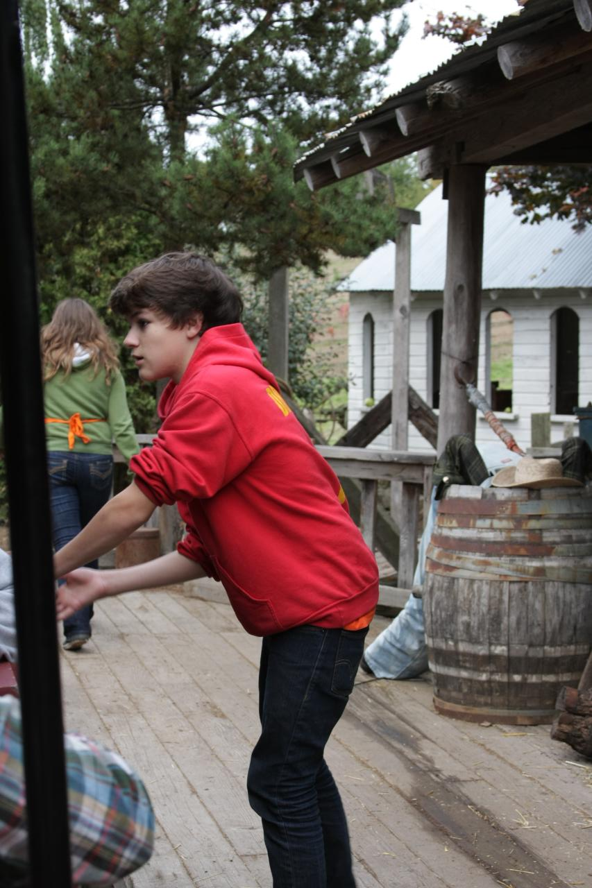 Jacob